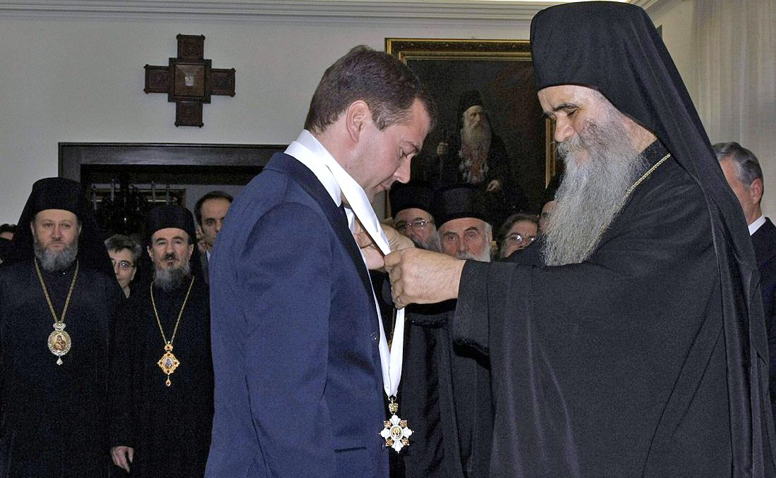 Дмитрий Медведев стал кавалером высшей награды Сербской православной церкви – ордена Святого Саввы. Орден вручил митрополит Черногорско-Приморский Амфилохий.